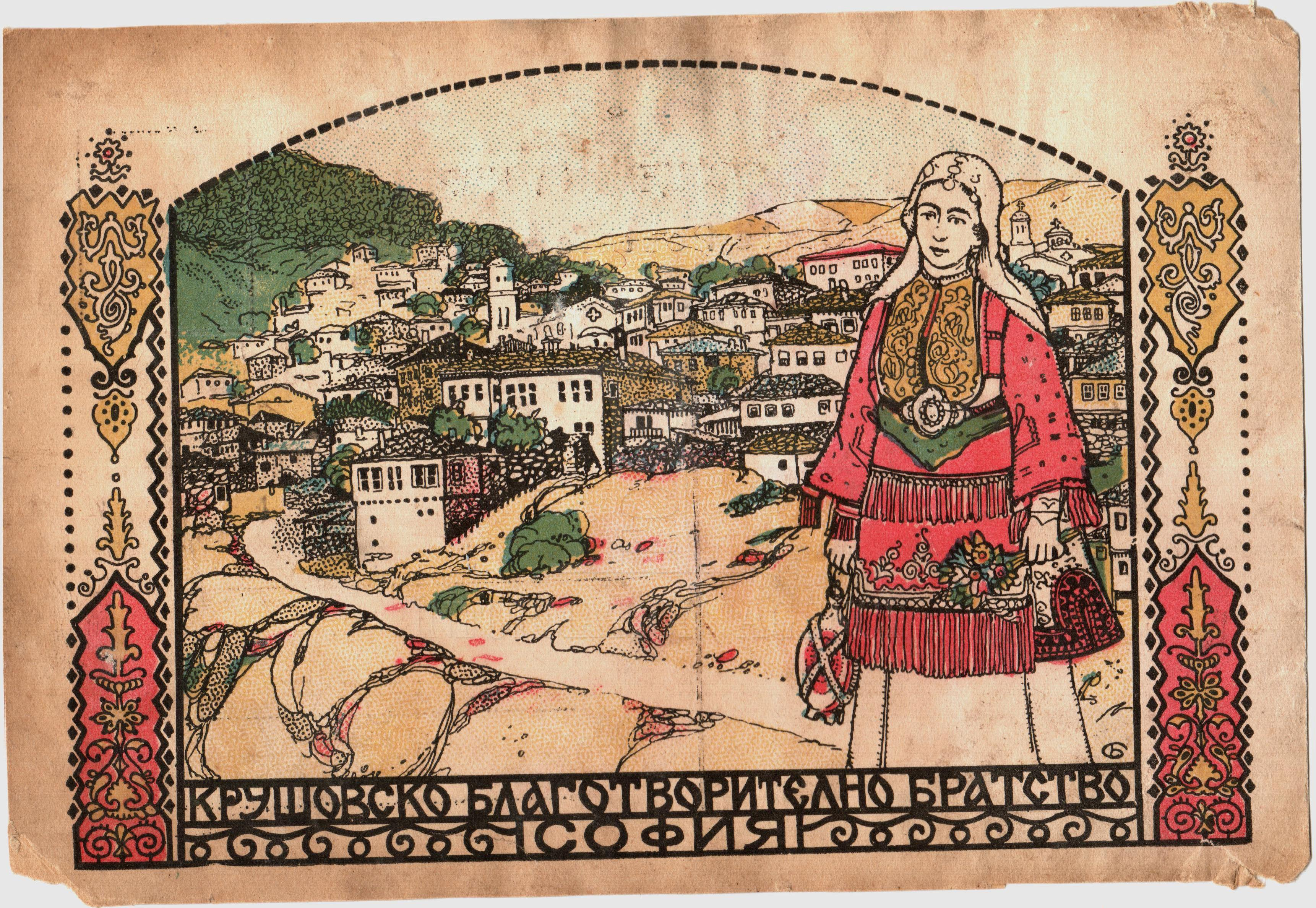 Издание на Крушевското братство.